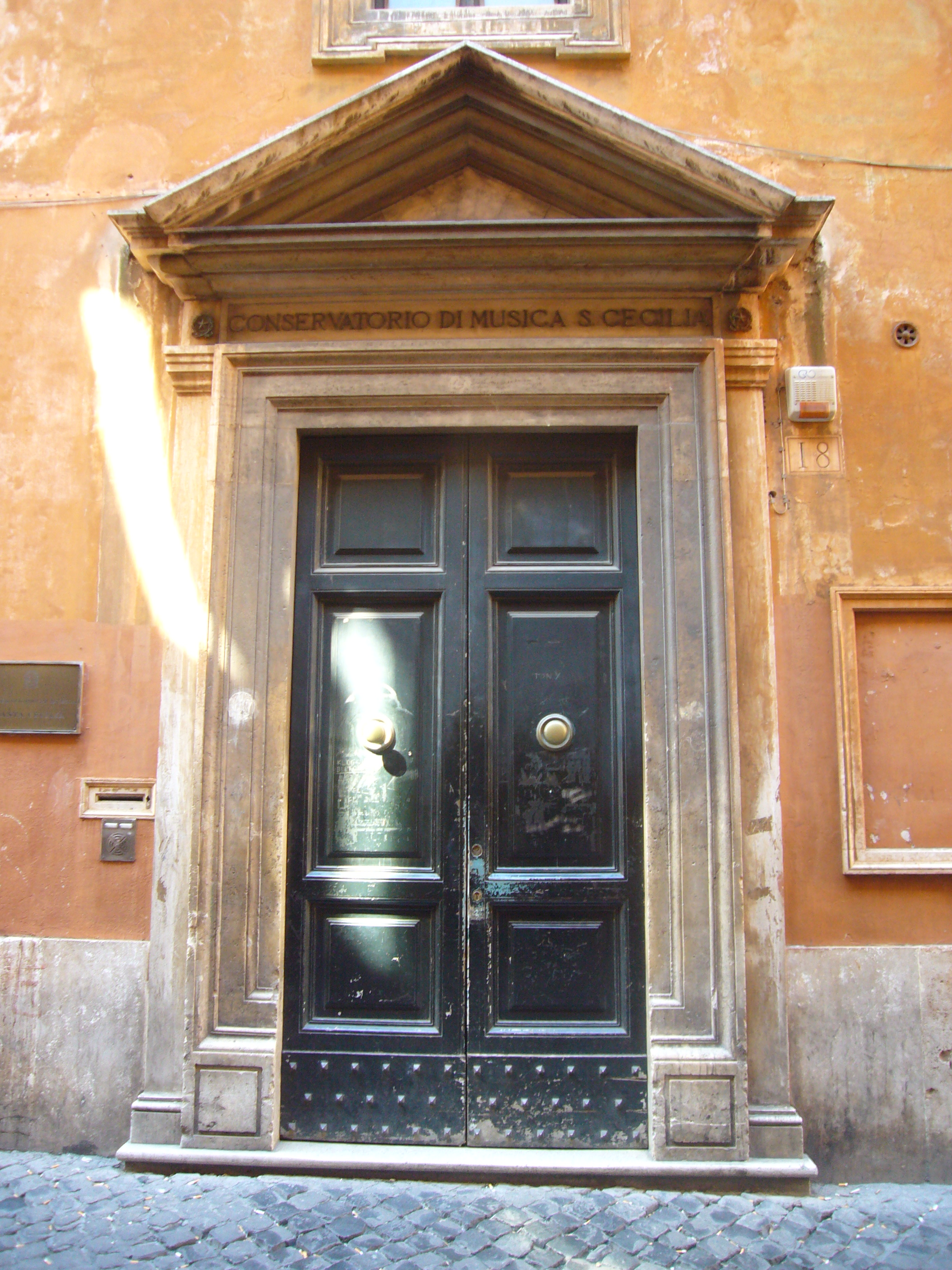 Roma, via dei Greci, ingresso del Conservatorio di santa Cecilia